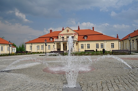 Leżajsk, dwór starościński, ob. Muzeum Ziemi Leżajskiej, 1760-1770, 1933